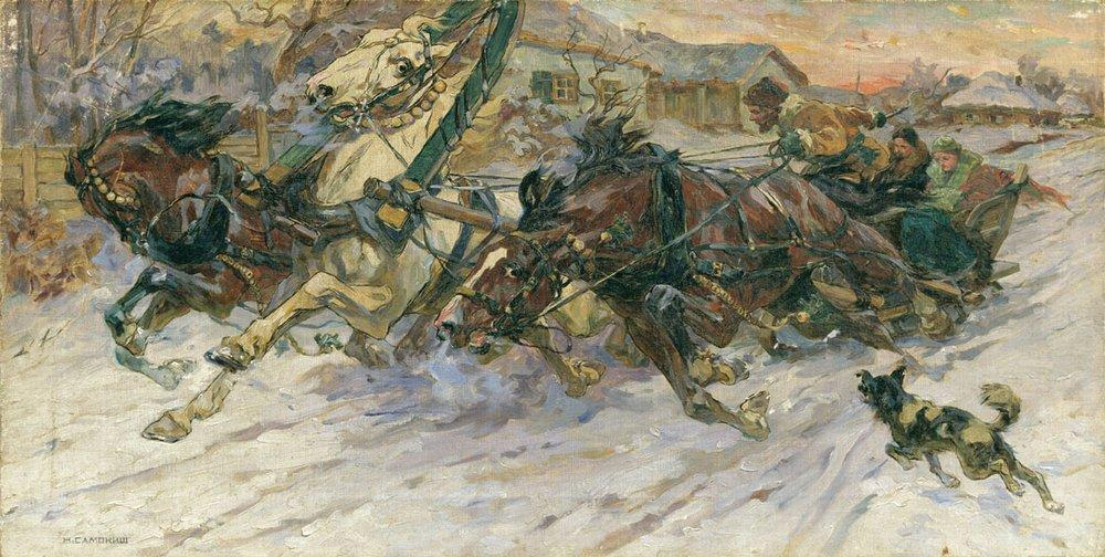 Тройка